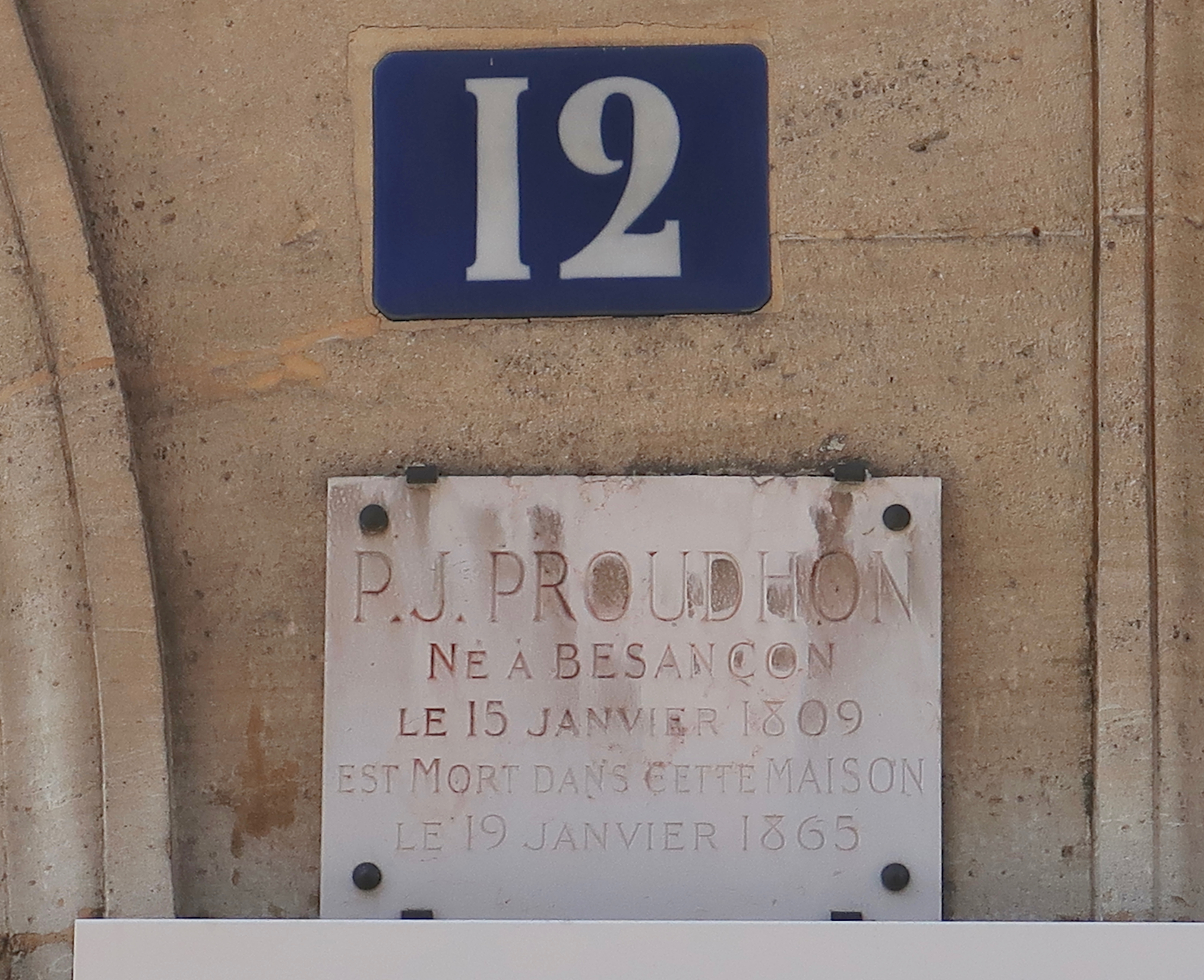 Plaque rendant hommage à Proudhon, rue de Passy (Paris, 16e).